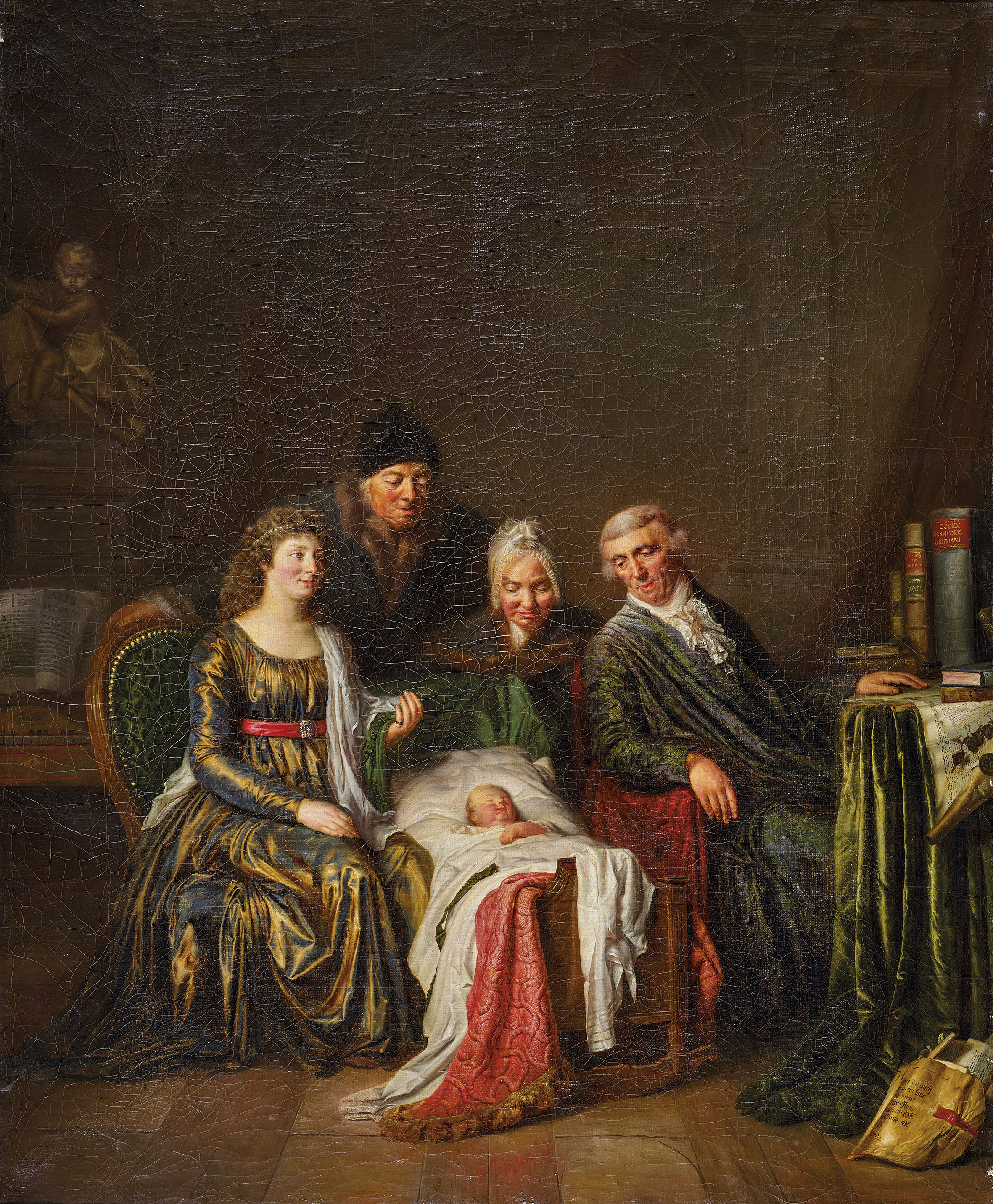 Die Familie des Deutsch-Lehenskomissärs Franz Salomon Wyss. Dargestellt sind (von links nach rechts): Margherita Tschiffeli (Gattin), Jakob Wyss (Vater, Landvogt nach Brandis), Franz Salomon Wyss (1796-1849) (Säugling, späterer Generalmajor), Magdalena Margaretha Thouvenin (Mutter), Franz Salomon Wyss (1750-1817) (Deutsch-Lehenskomissär).